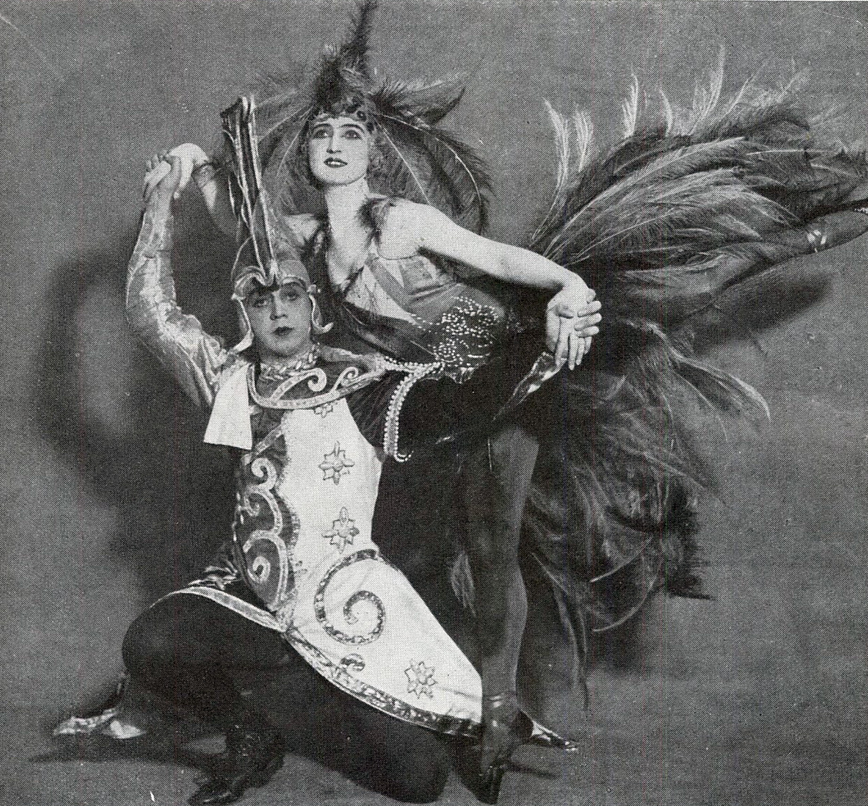 Elly Holmberg (1903-2001) och Sven Tropp (1890-1964) i Eldfågeln. (Omslag till Scenen 1927).